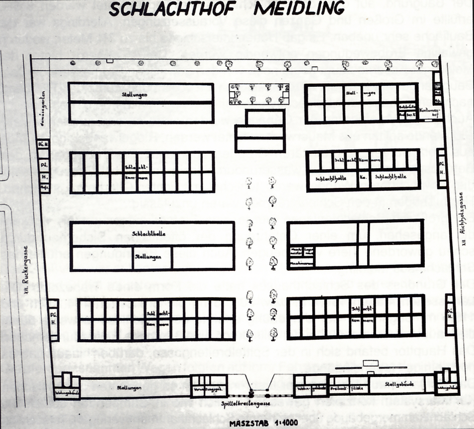 Grundriss des Schlachthofes in Unter-Meidling (um 1890)